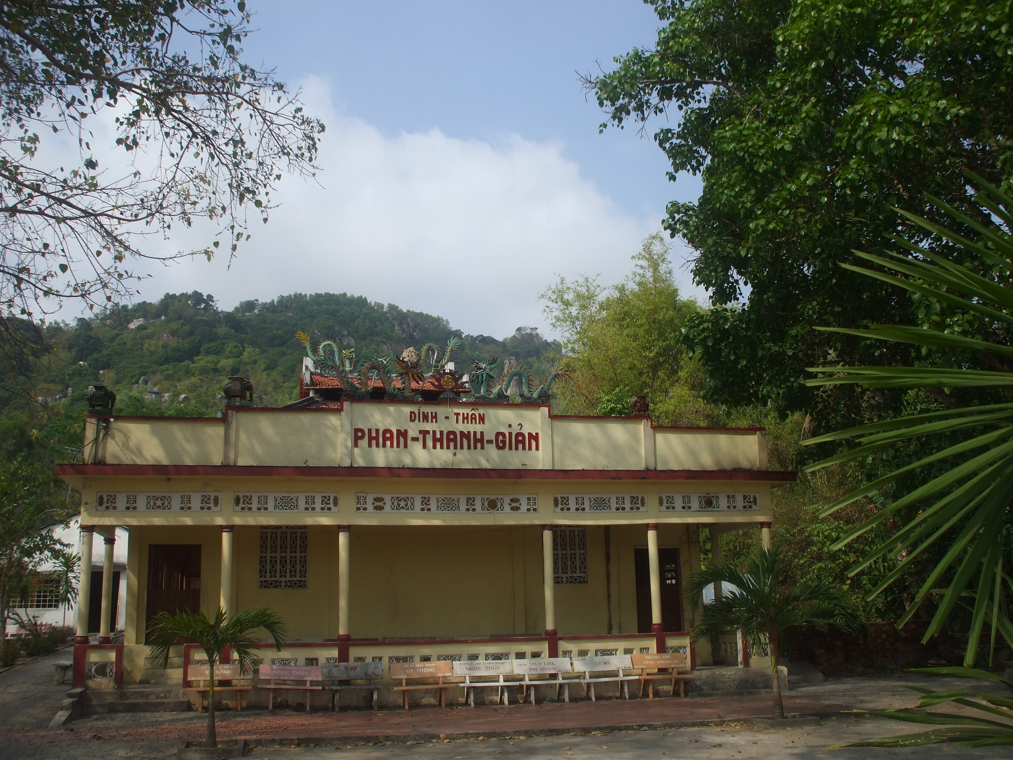 Đình thần Phan Thanh Giản tại chân núi Ba Thê, thị trấn Óc Eo, huyện Thoại Sơn , tỉnh An Giang.